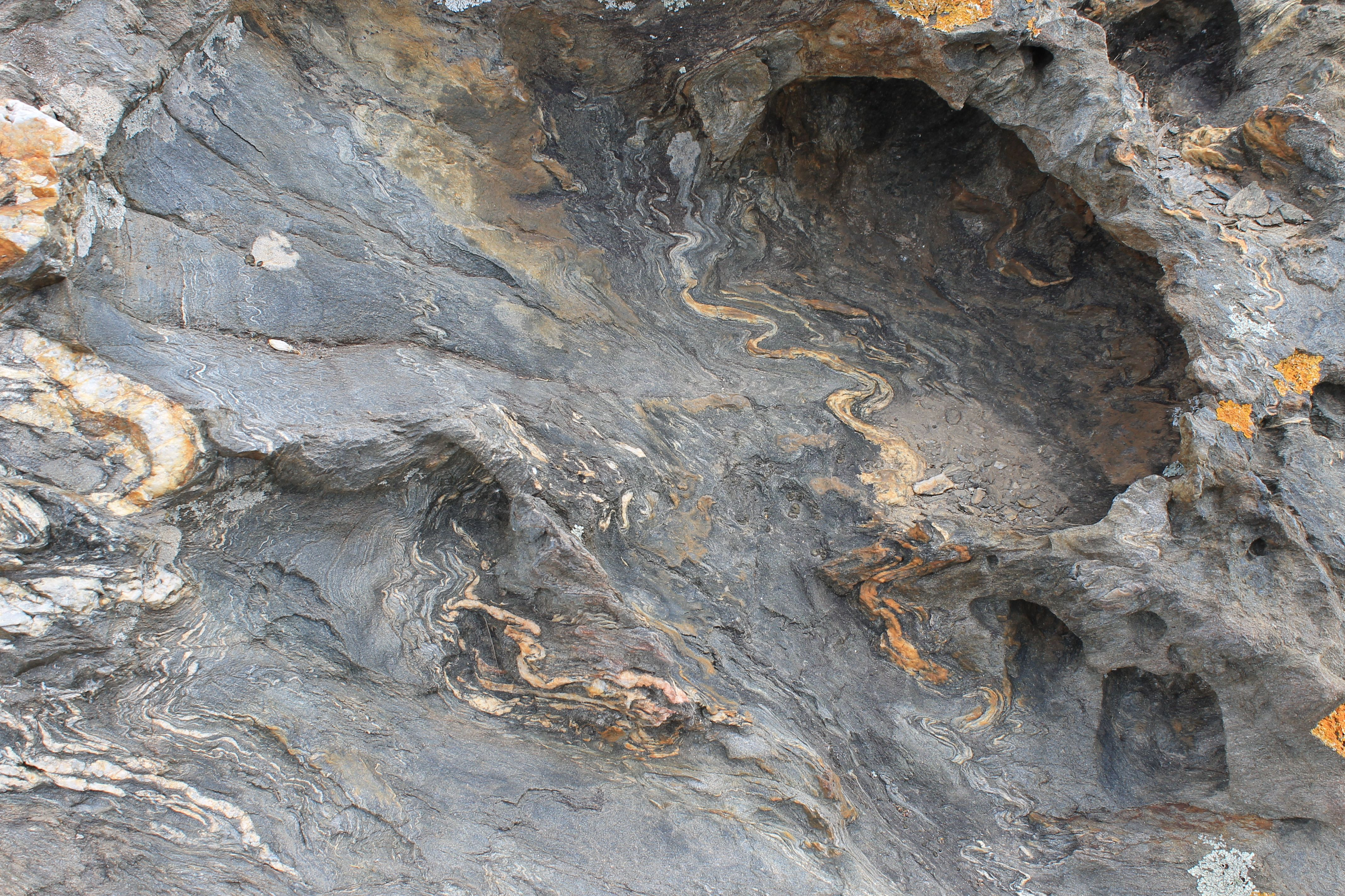 Geological formation, Spain, northeastern coast, Parc Cap de Creus (Migmatit: Die hellen, aufgeschmolzenen Gesteinsbestandteile (Leukosom) zeigen eine intensive Verfaltung (Ptygmatisierung).